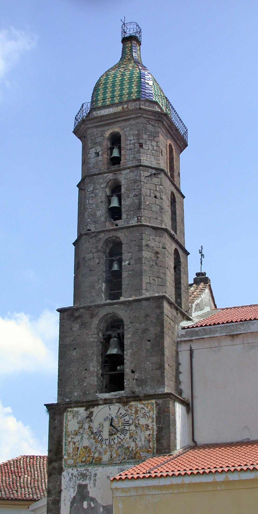 Italia, regione Campania, provincia di Caserta, Roccamonfina, chiesa di Santa Maria Maggiore, campanile